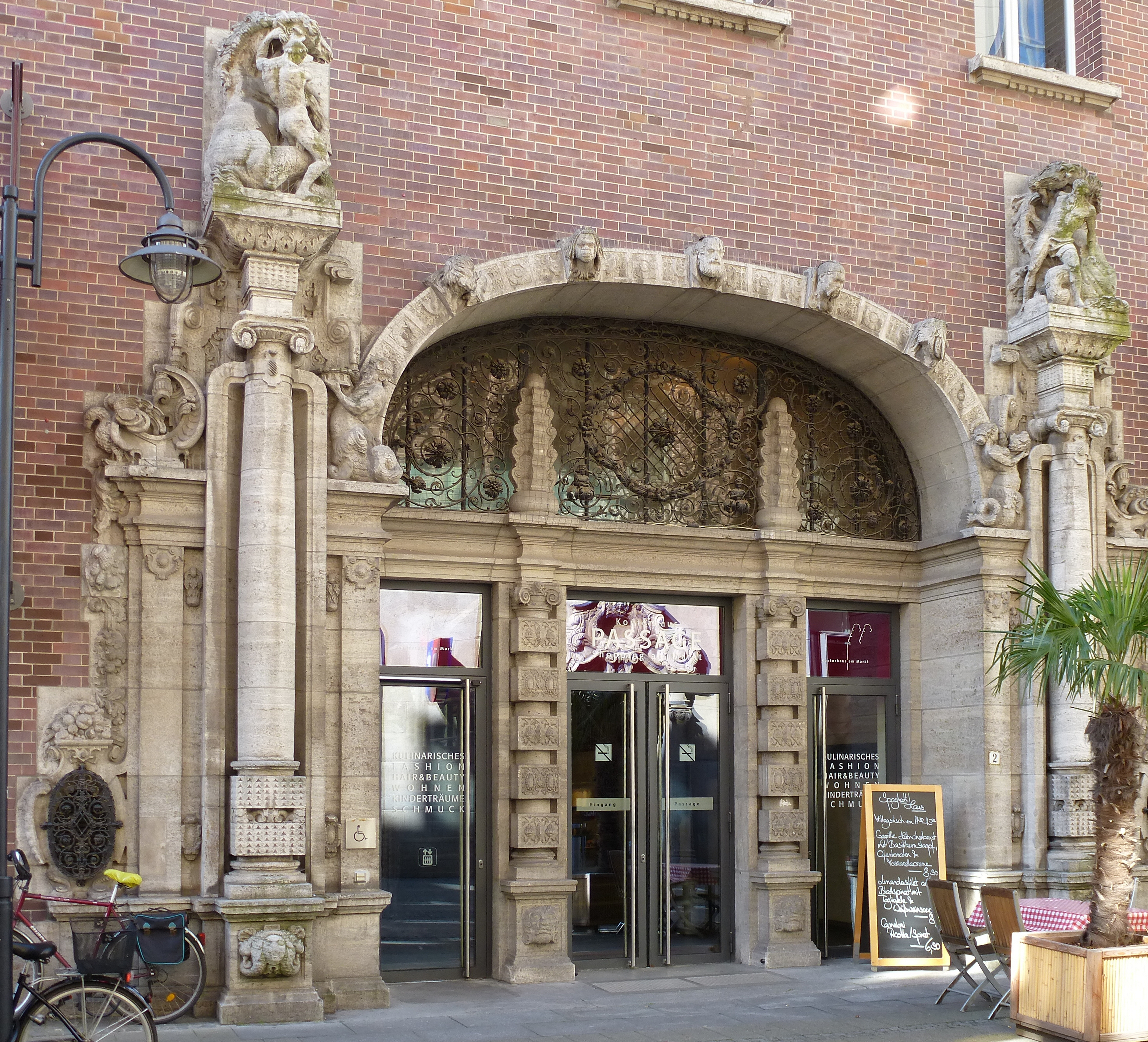 Disconto-Bank, Passage - Kontorhaus am Markt in Bremen, Langenstraße 2; Portal NordseiteDas abgebildete Objekt ist ein geschütztes Kulturdenkmal in der Freien Hansestadt Bremen, mit der Nr. 0830 beim Landesamt für Denkmalpflege registriert.